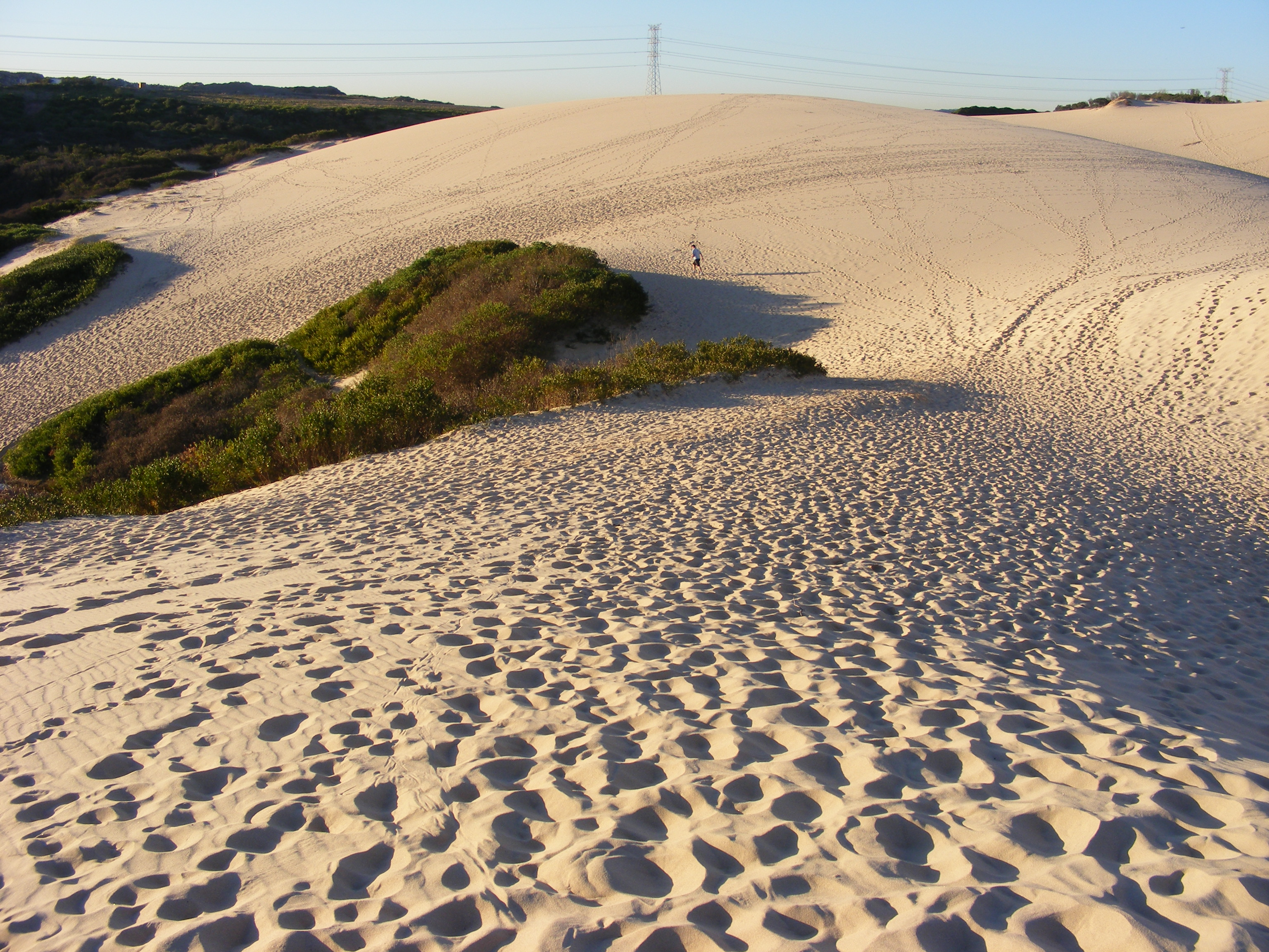 Cronulla sand dunes